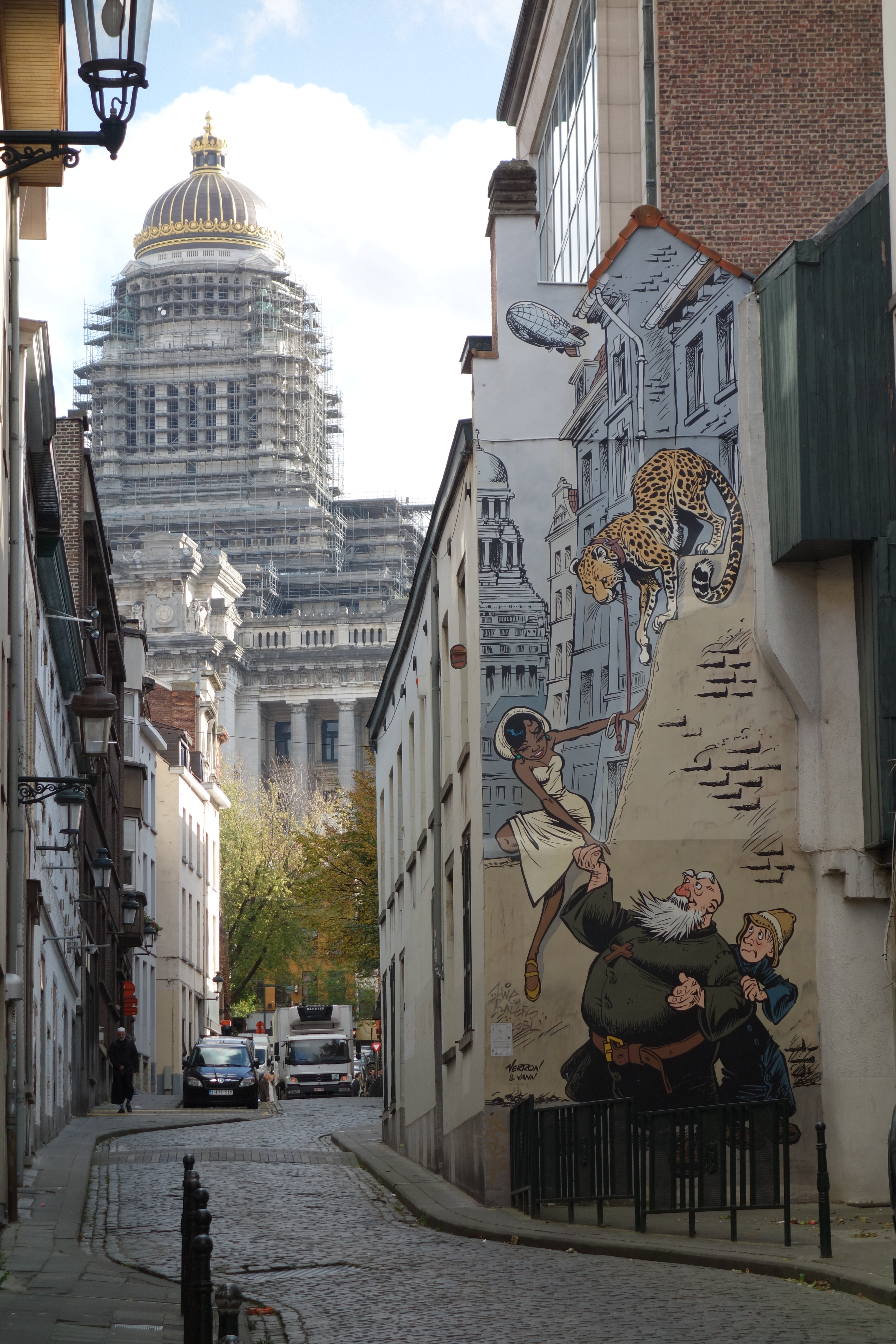 Kapucijnenstraat, Brussel